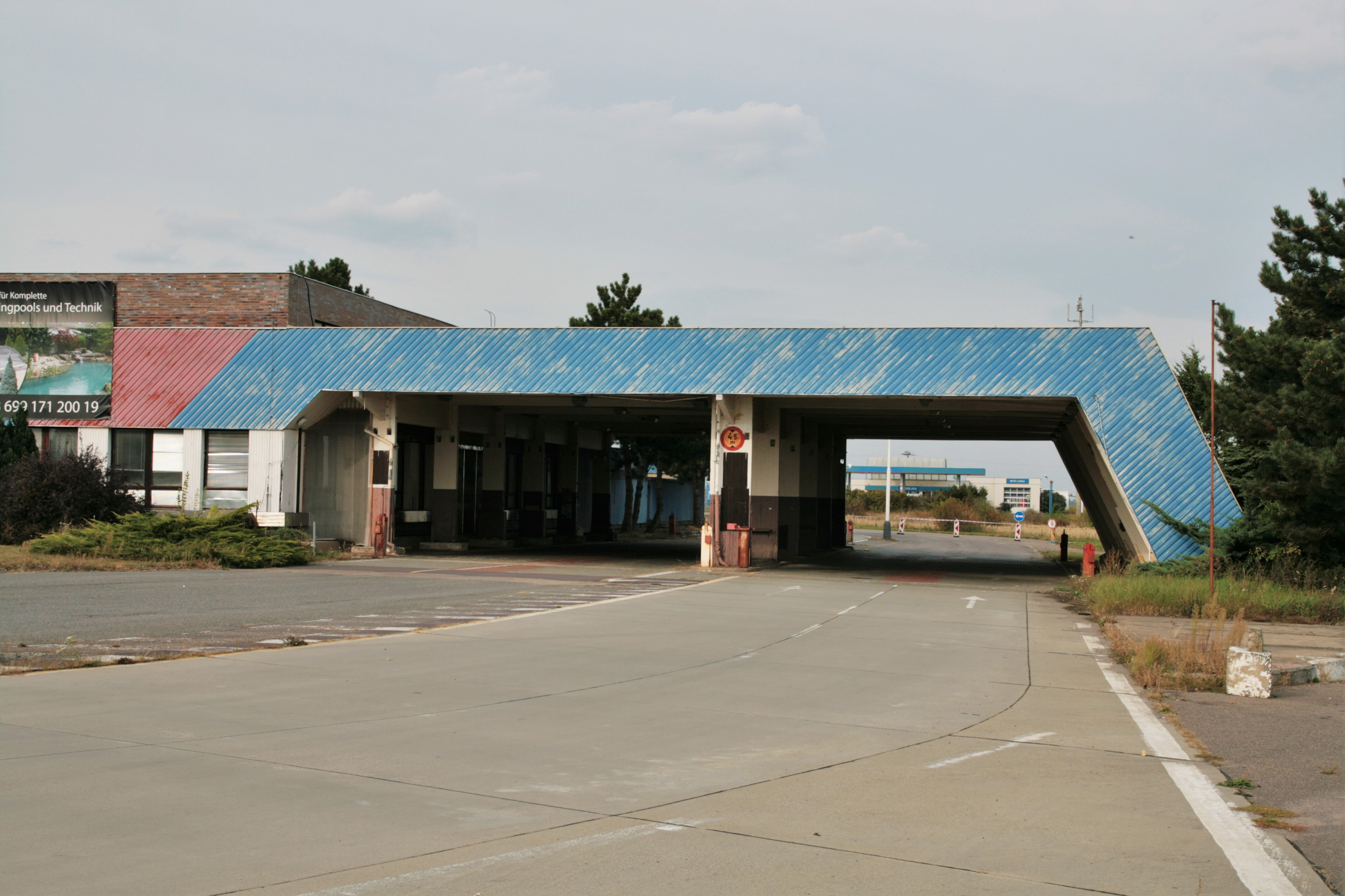 Zaniklá vesnice Hatě, část obce Chvalovice v okrese Znojmo. Přístřešek někdejší hraniční kontroly.